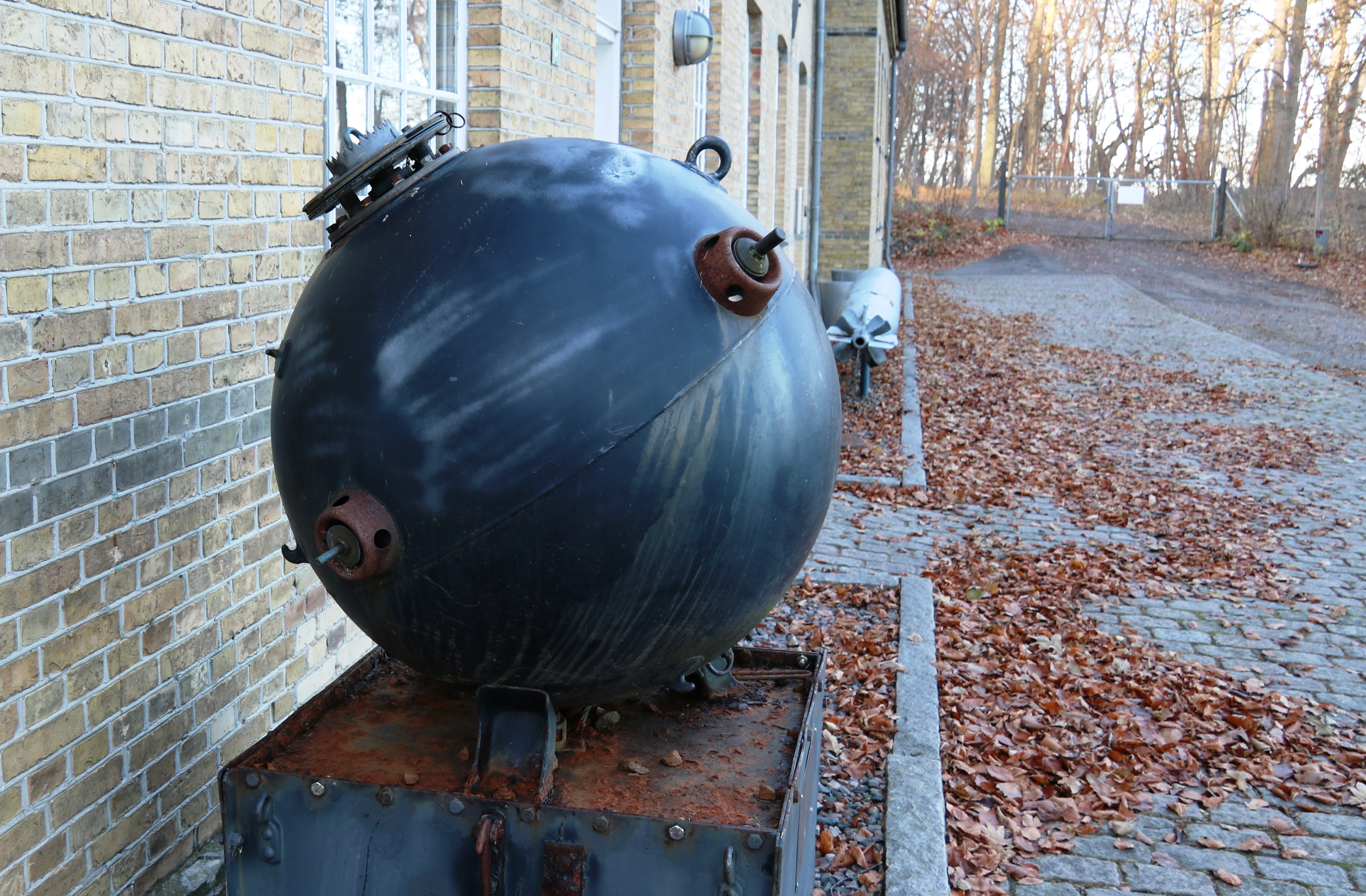 Aktiv mine udstillet ved Søminestationen, Holbæk, Denmark